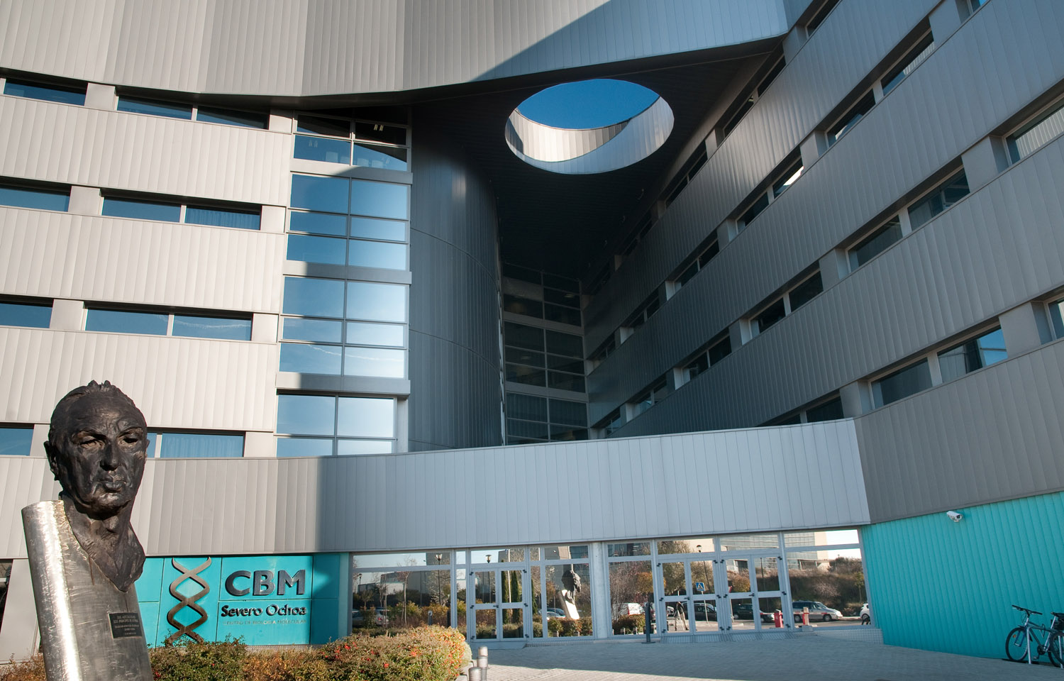 Edificio del Centro de Biología Molecular Severo Ochoa